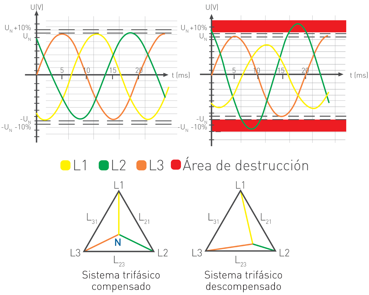 Grafica de sobretensiones transitorias